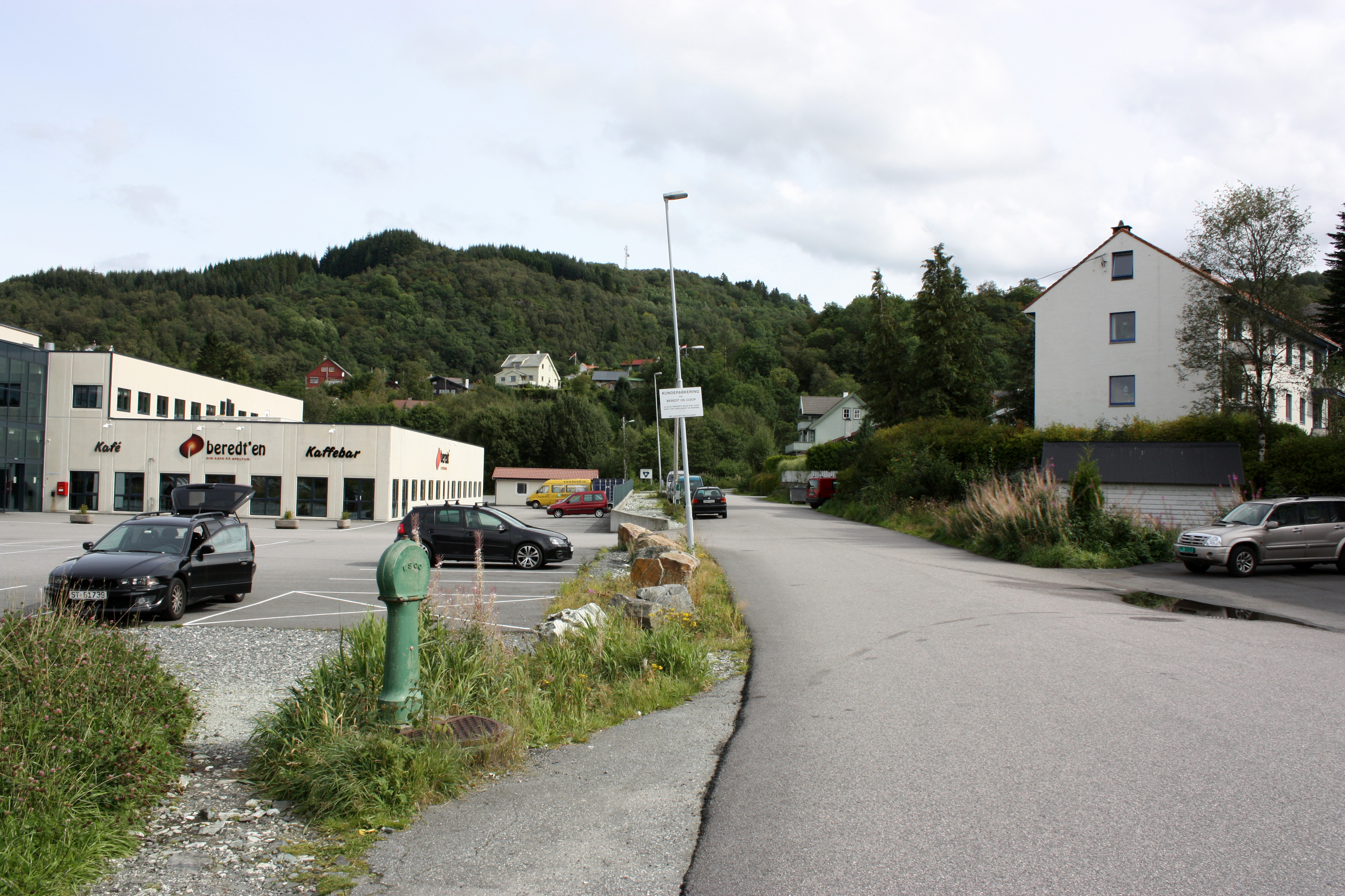 Nedre Nøttveit, Fana, Bergen. August 2009.